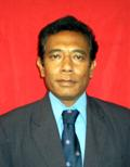 Fernando de Araújo, Abgeordneter des Nationalparlaments Osttimors